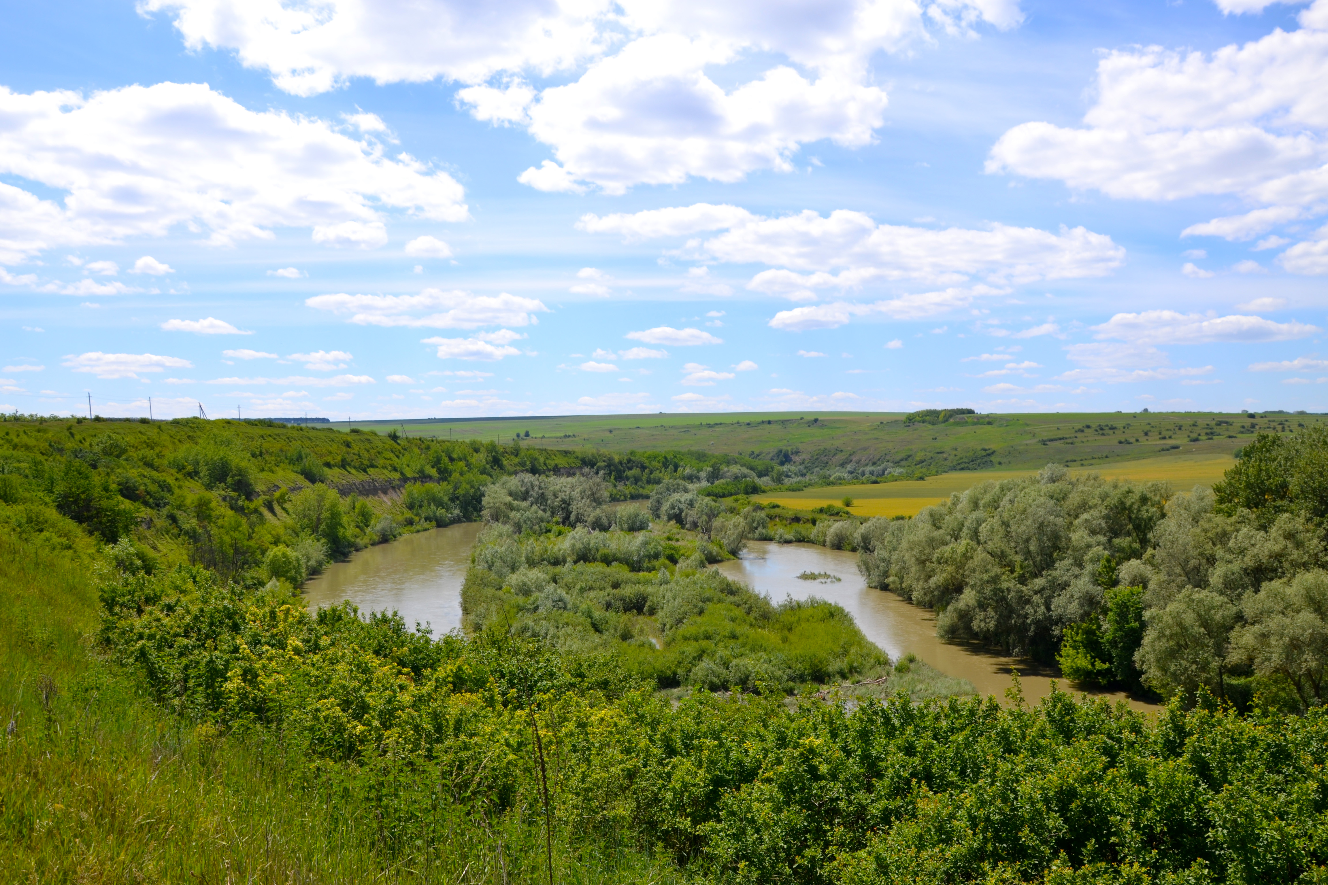 raionul Briceni, la sud de satul Pererîta